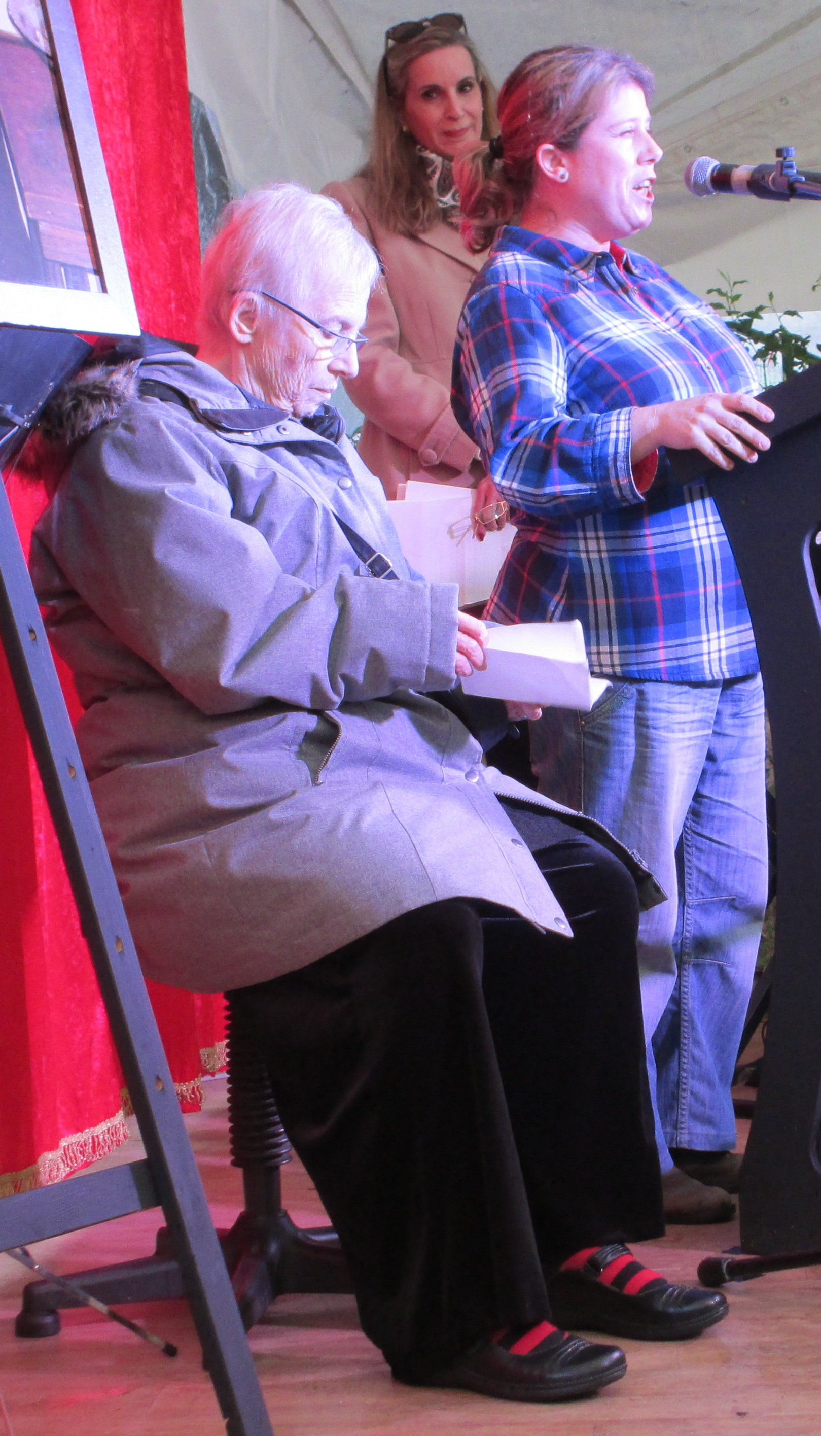 חיתוך מהקובץ המקורי